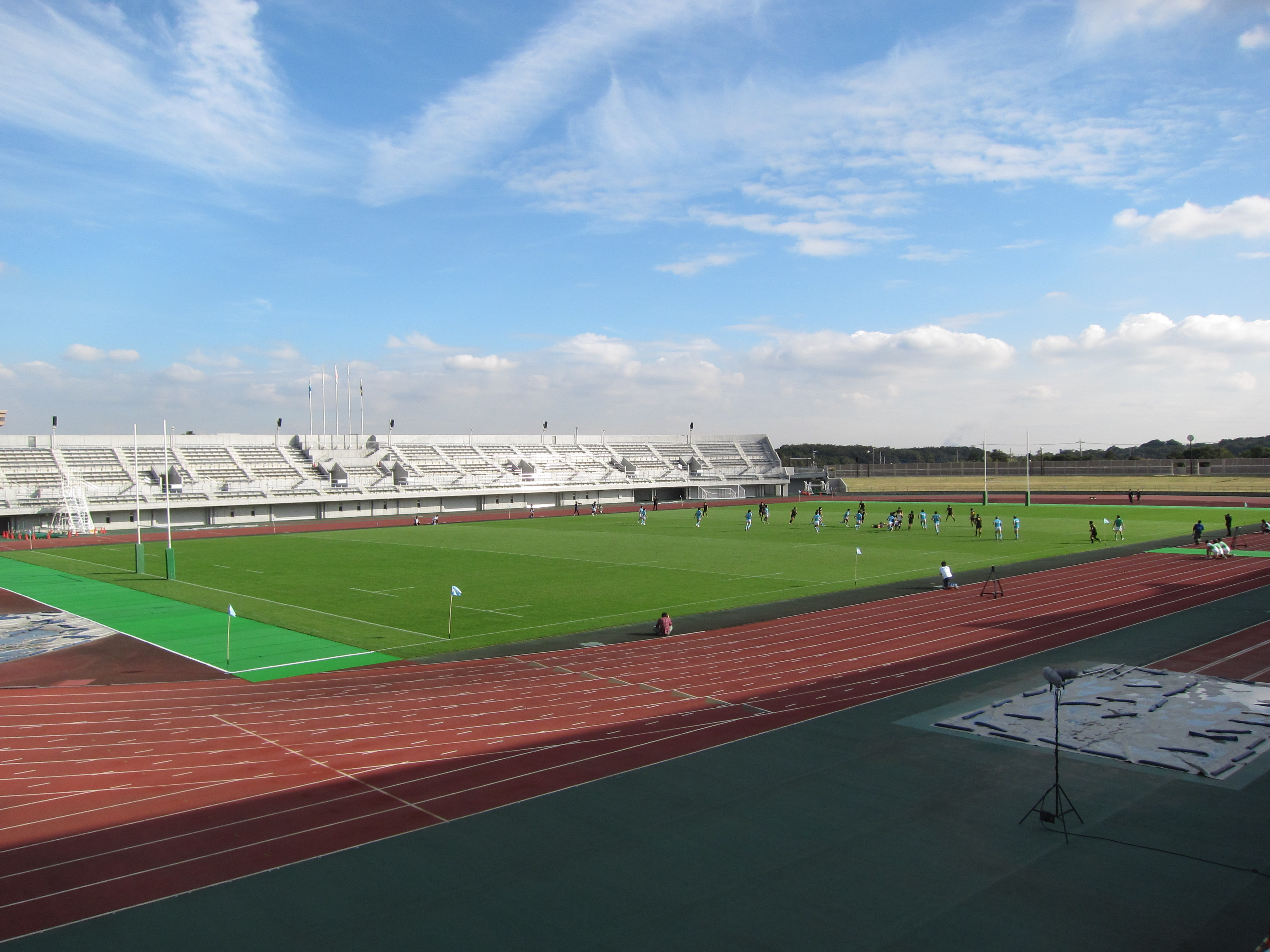 麻溝公園競技場バックスタンド